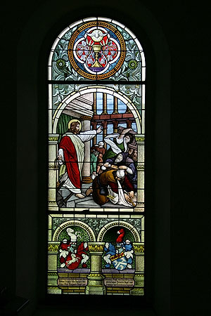 Kirchenfenster in der Kirche von Regensberg